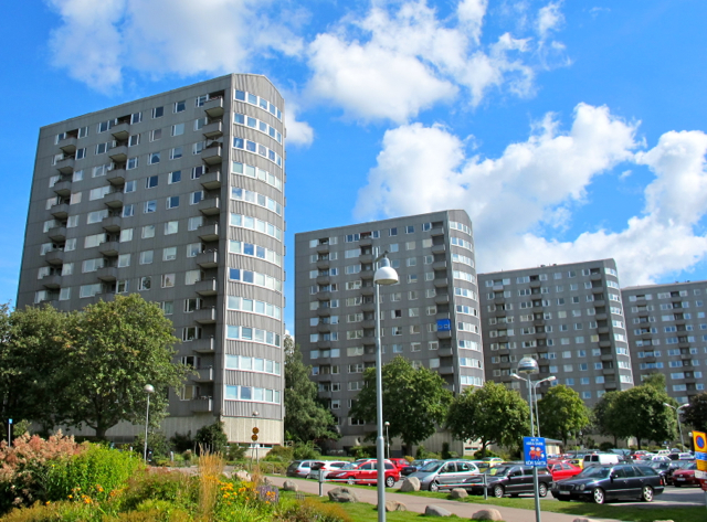 Höghusen på Dragspelsgatan i Västra Frölunda i Göteborg, populärt kallade "Kommandobryggorna"